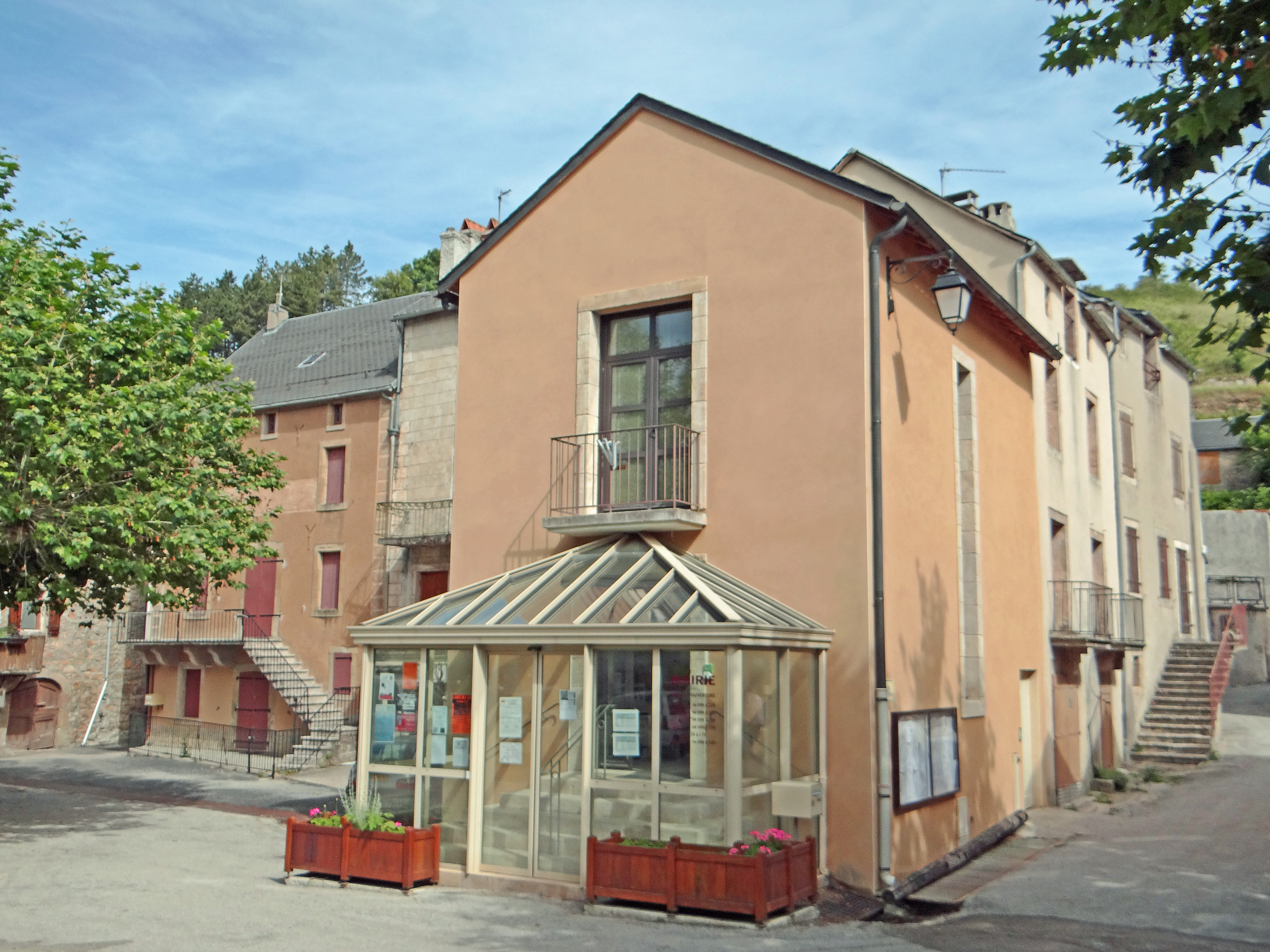 Lanuéjols (Gard) - Mairie